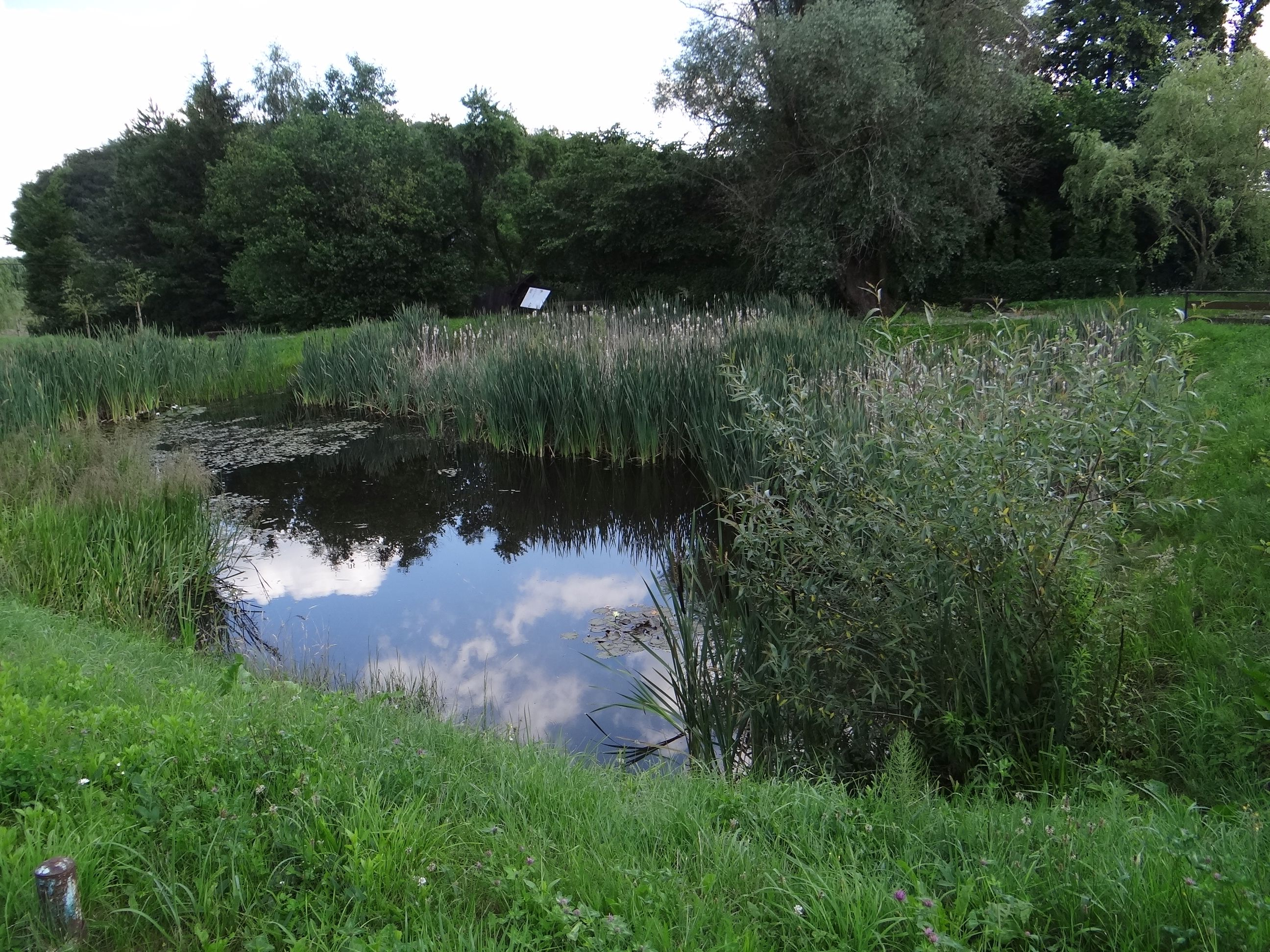 Staw w Żarach